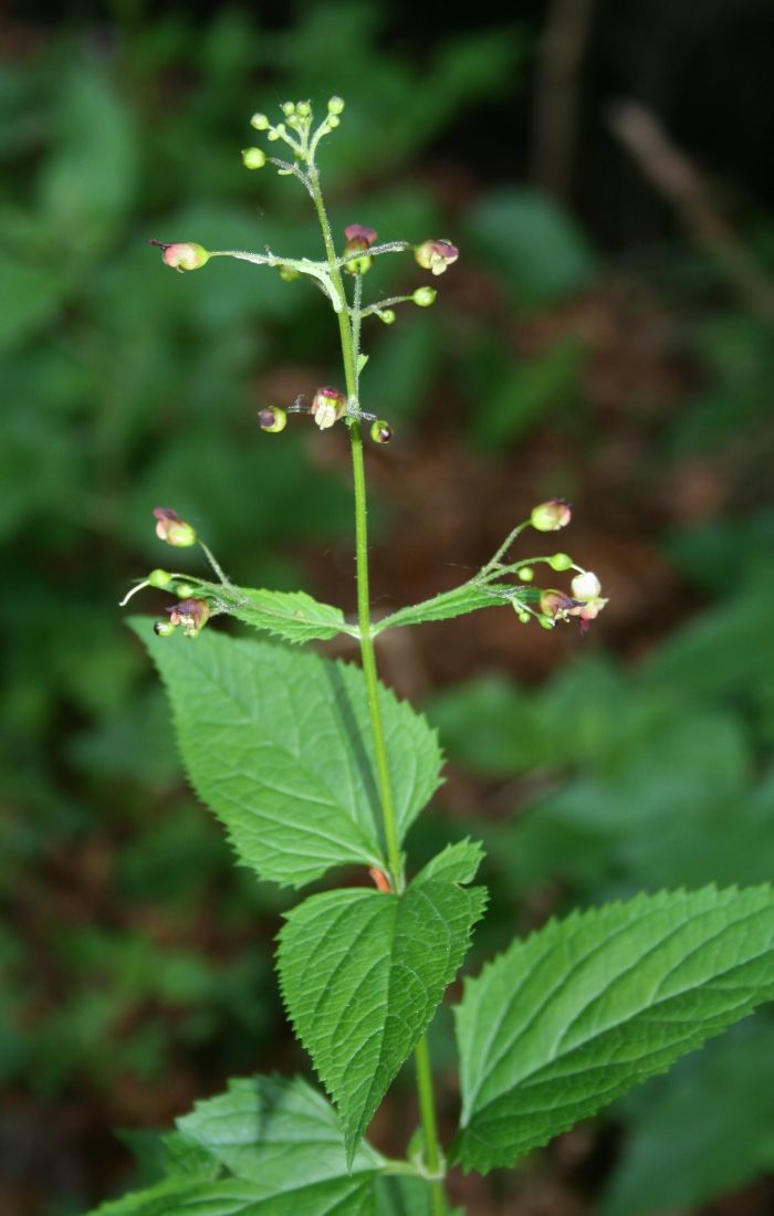 Knoten-Braunwurz (Scrophularia nodosa), Braunwurzgewächse (Scrophulariaceae) - Österreich/Austria/Autriche: Oberösterreich, Hausruckviertel, Kien NW Attnang-Puchheim